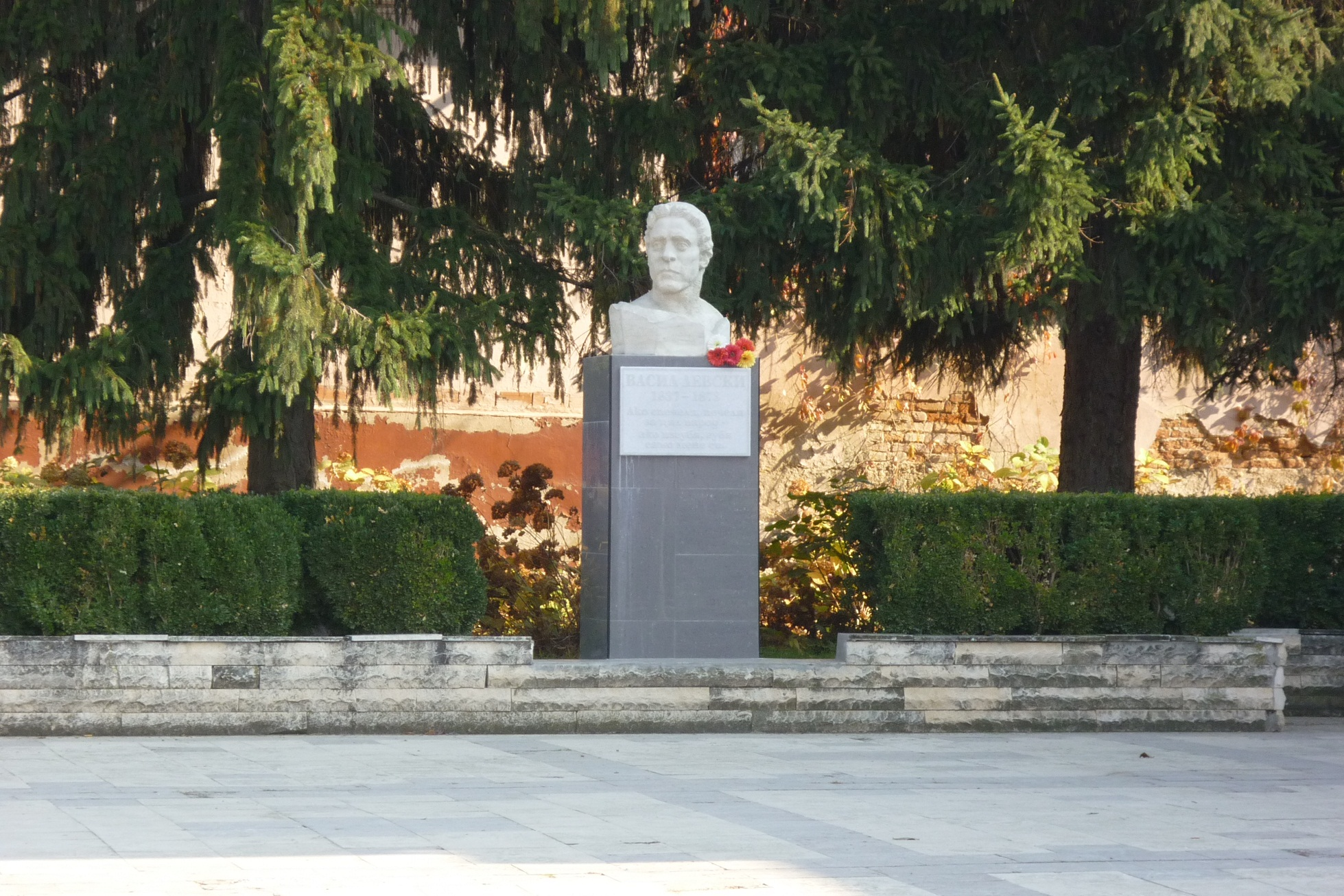 Паметник на Васил Левски